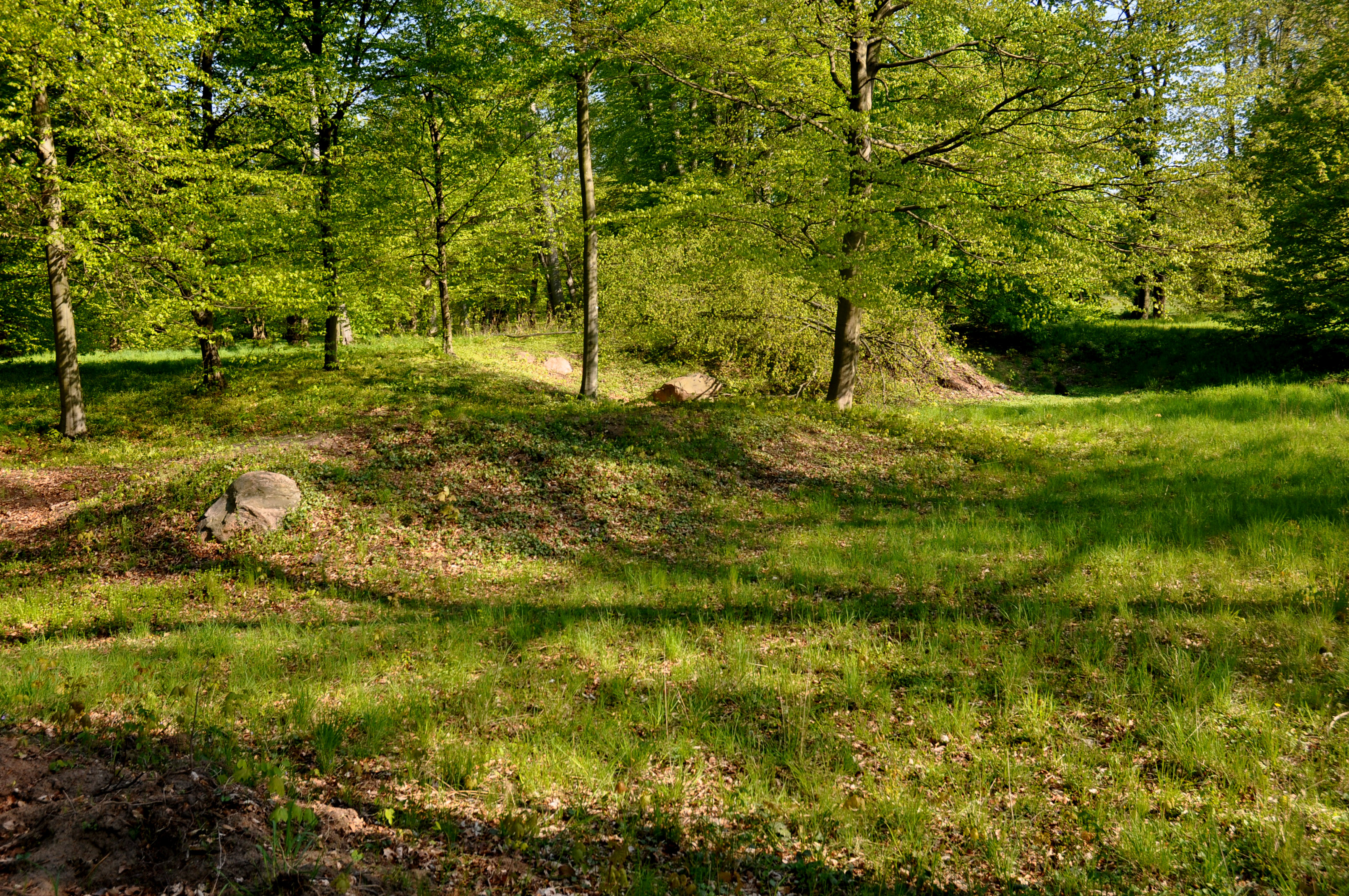 Park Klein-Glienicke, trockengefallener Schlossteich, die Steine markieren den ehemaligen Uferverlauf